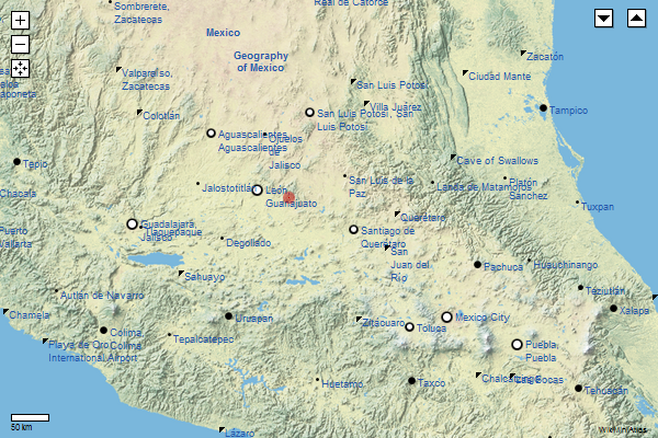 versión física